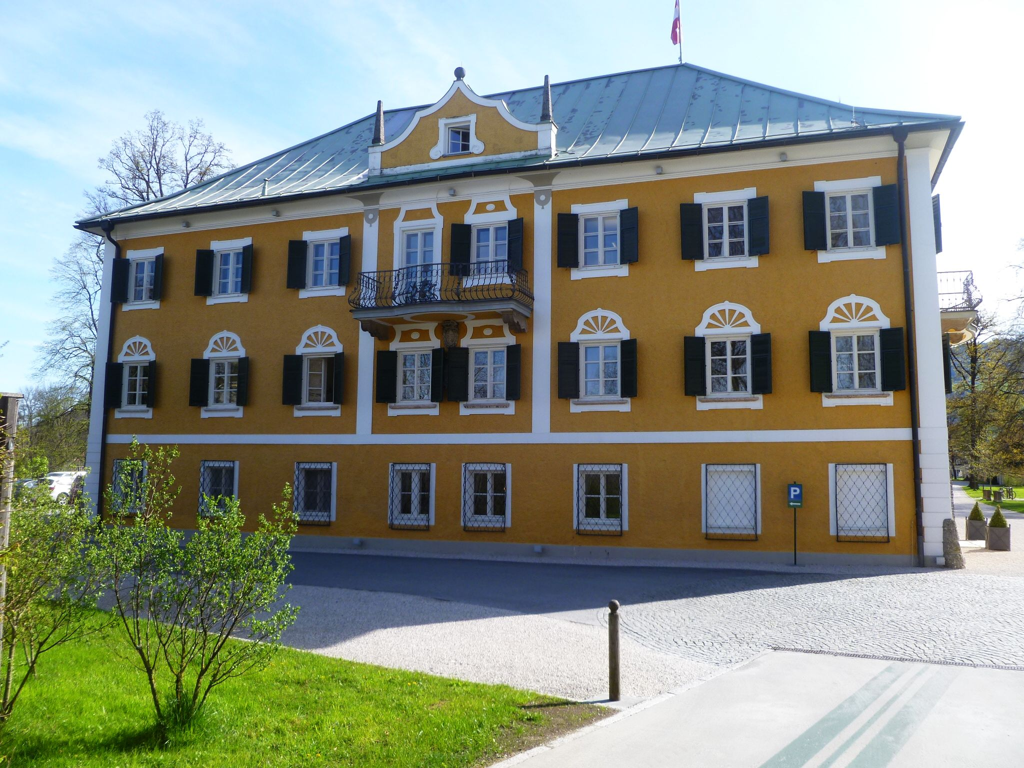 Rupertihof/Schlosshotel St. Rupert